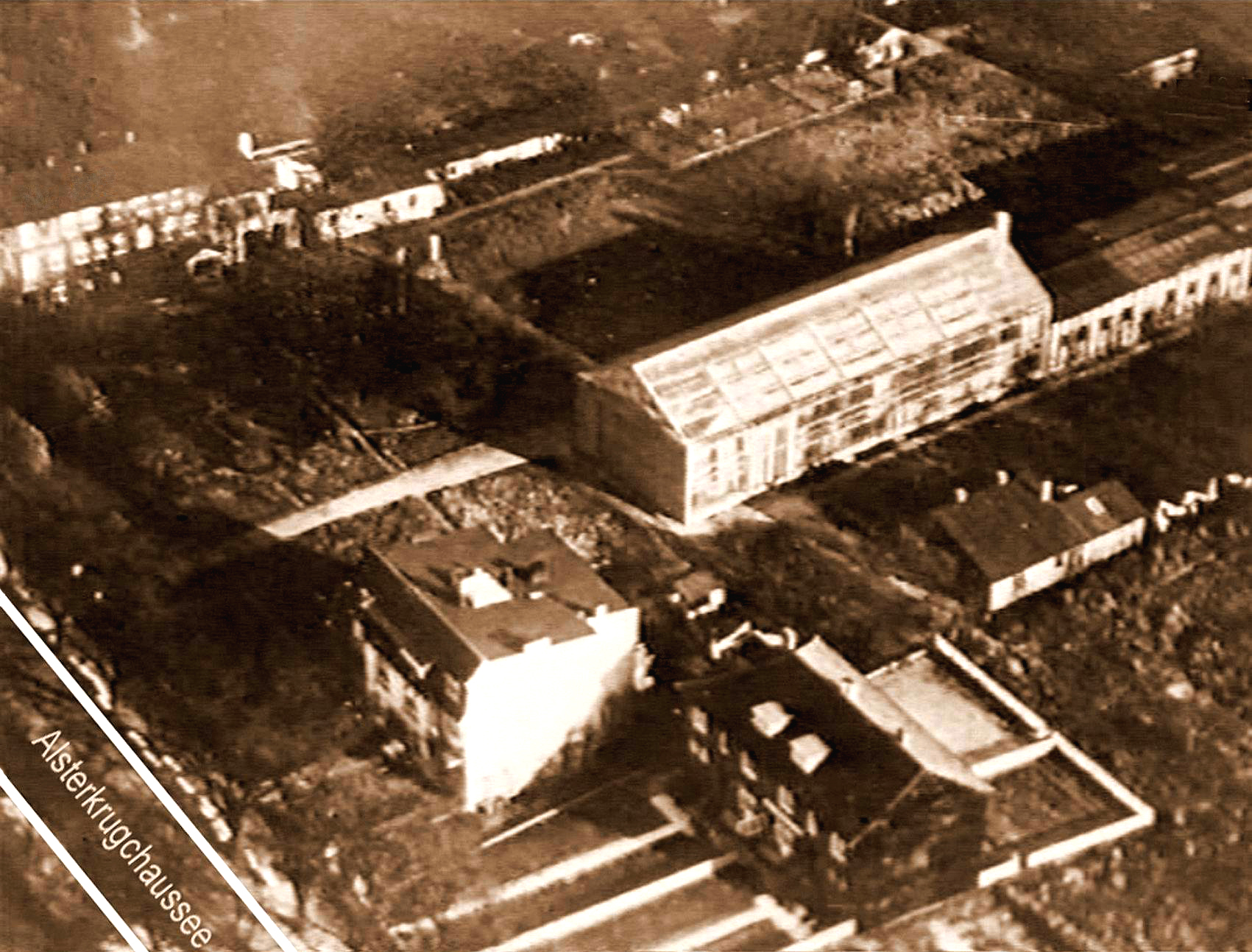 Vera-Filwerke AG, frühe 1920er